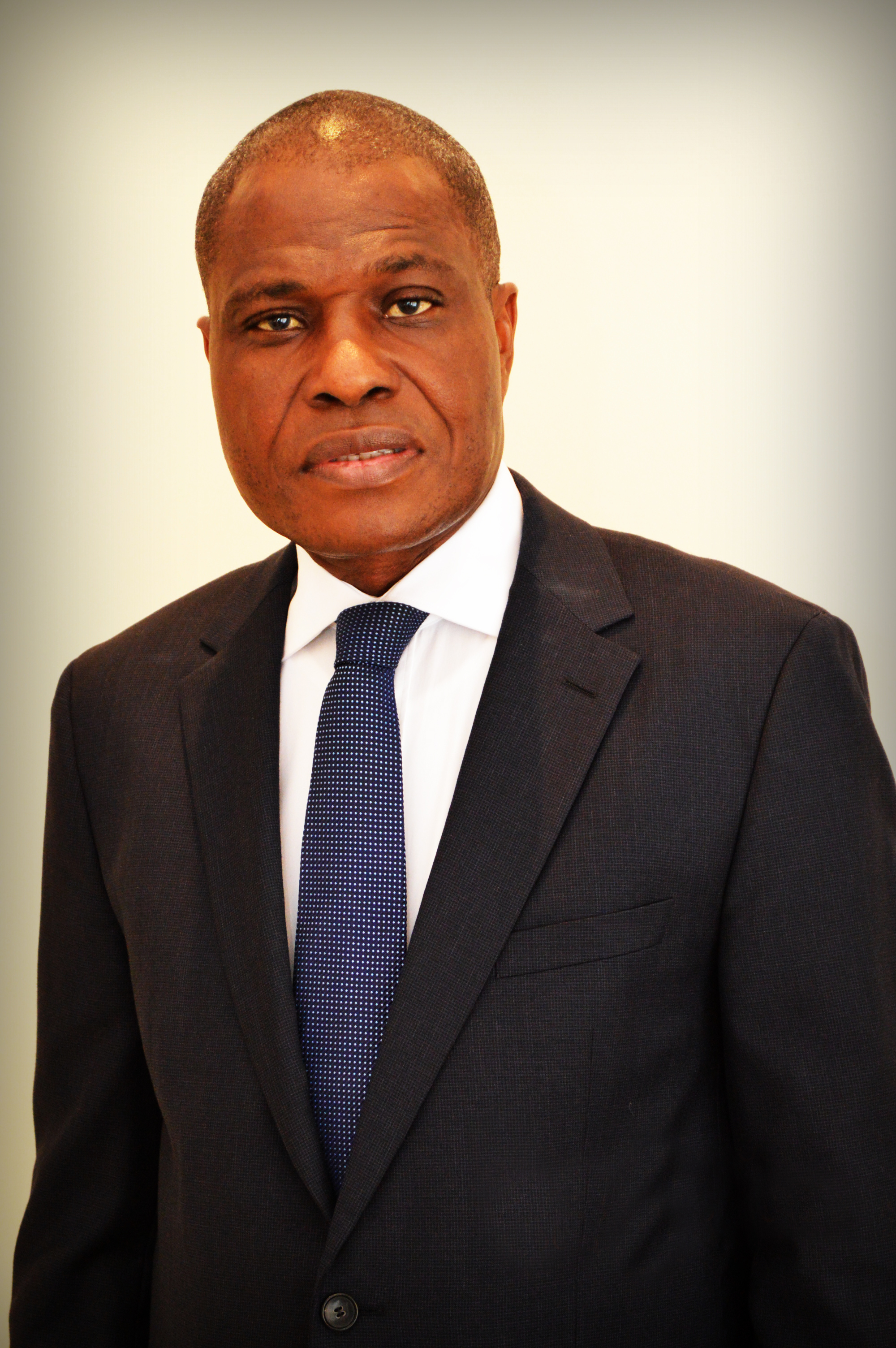 homme politique congolais